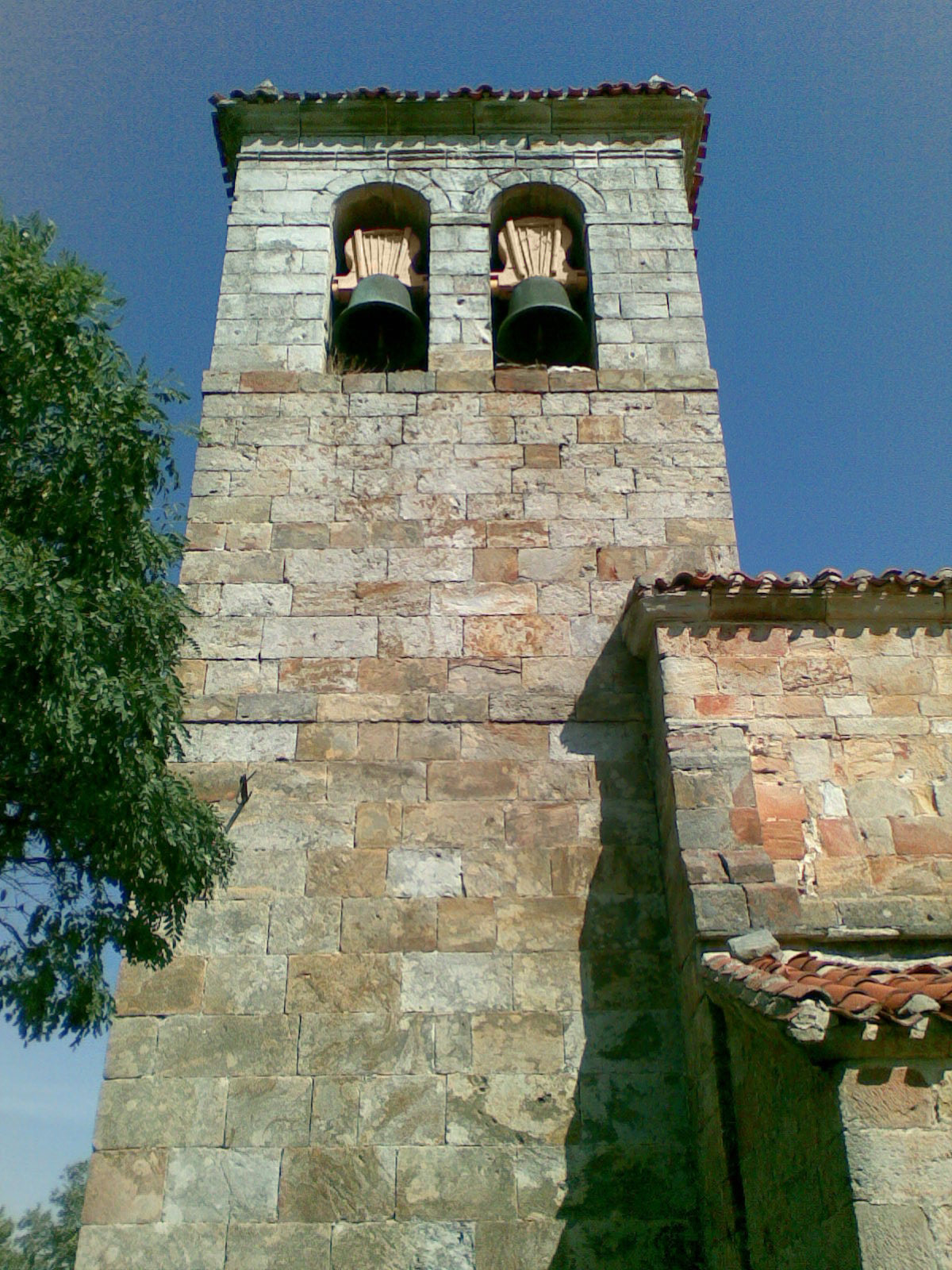 Torre de la iglesia de San Juan bautista en Olleros de Paredes Rubias (Palencia, Castilla y León).